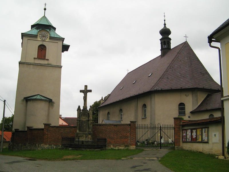 Kostel svatého Mikuláše, Horní Sloupnice.